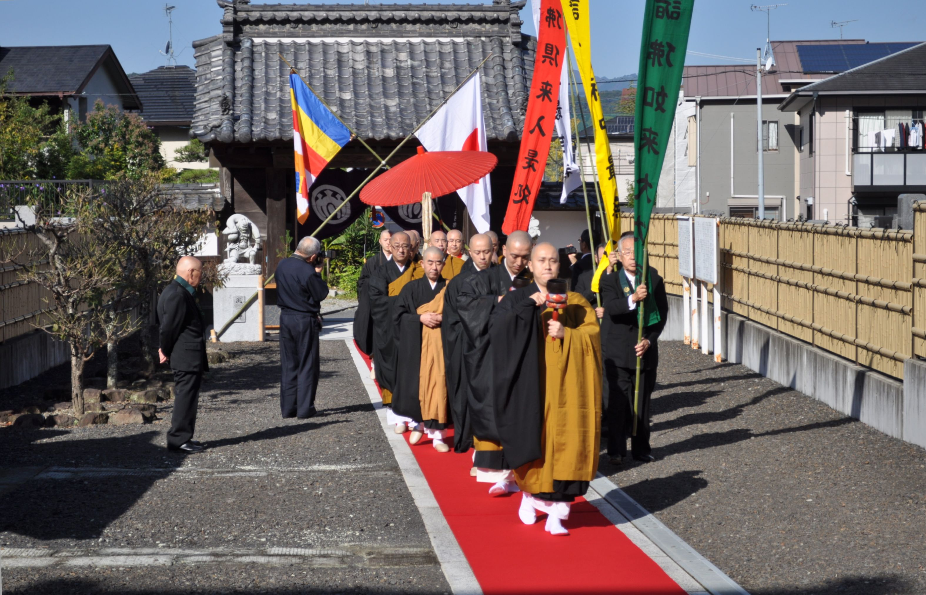 長源院 晋山式